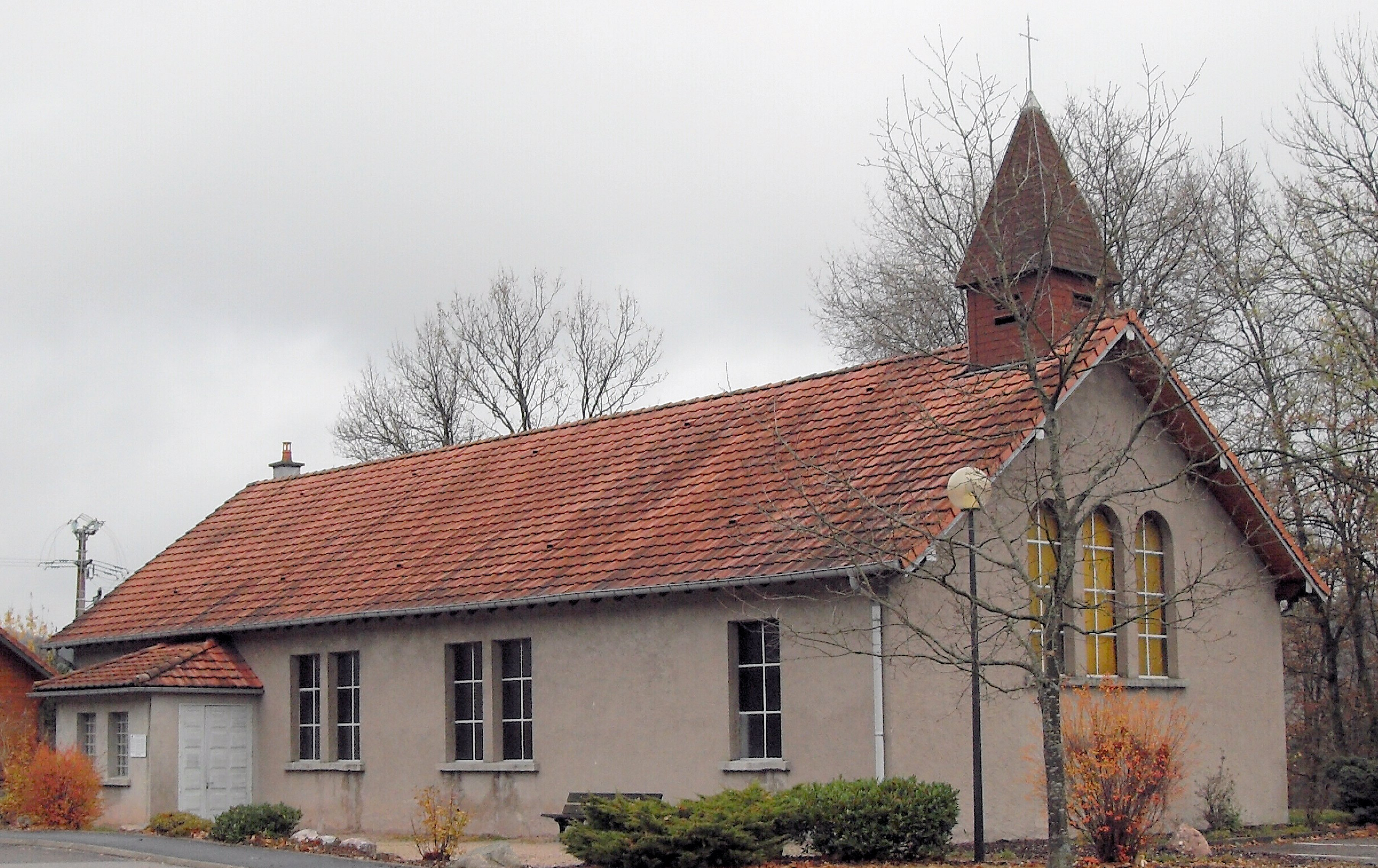 La chapelle Notre-Dame à Fallières, commune de Saint-Nabord